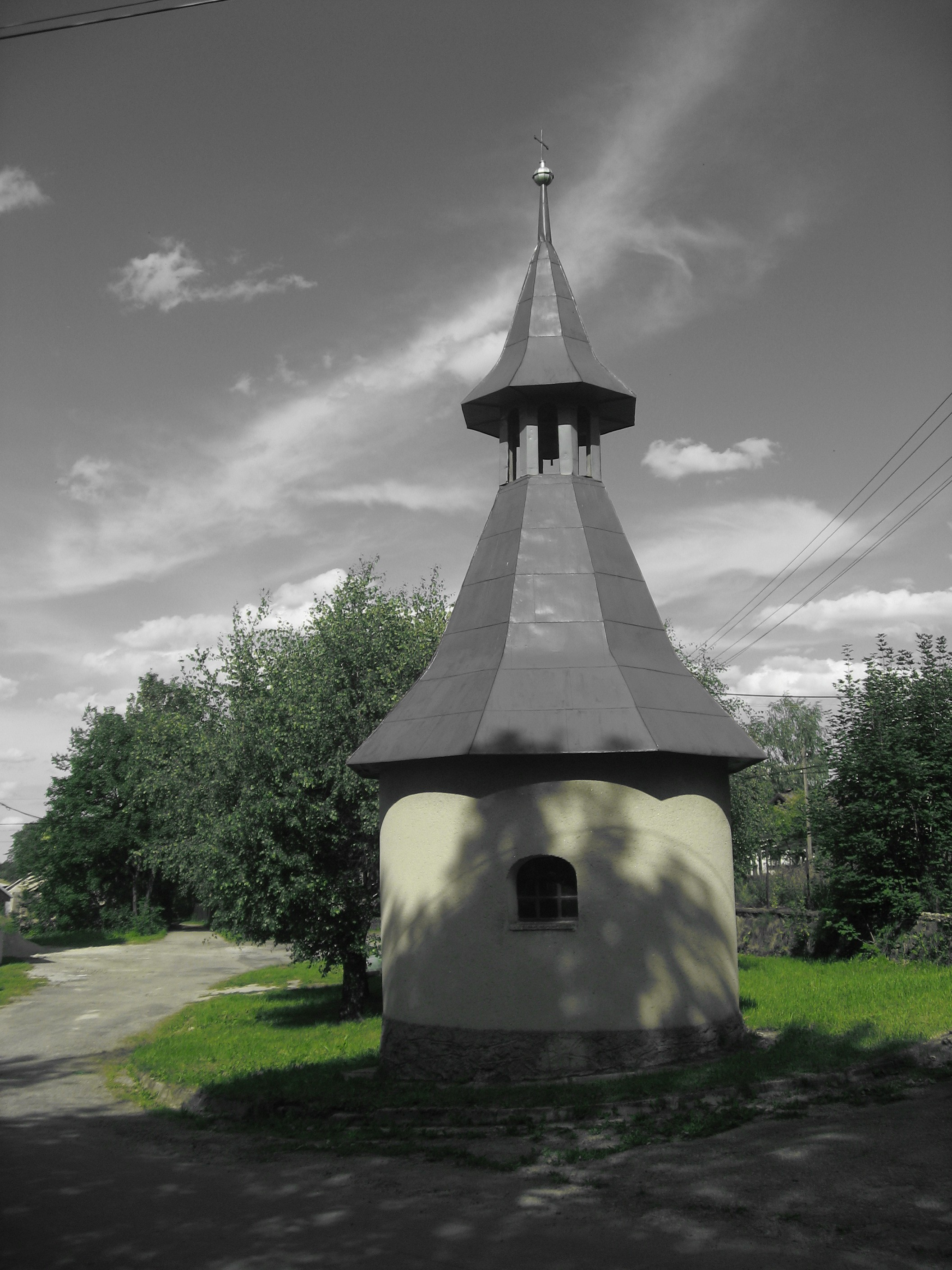 Zbinohy, kaplička